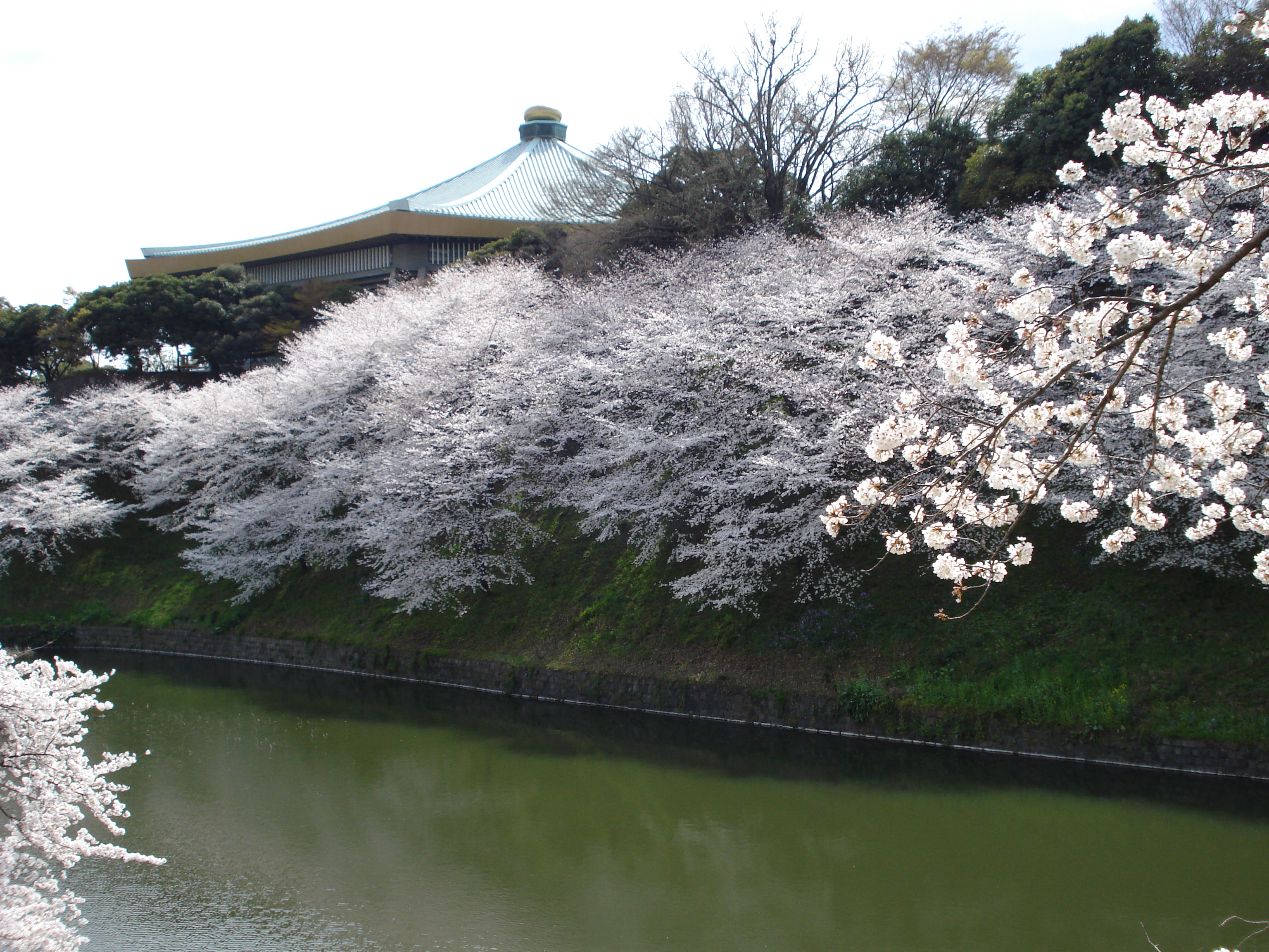 sakura, near Nippon Budokan.